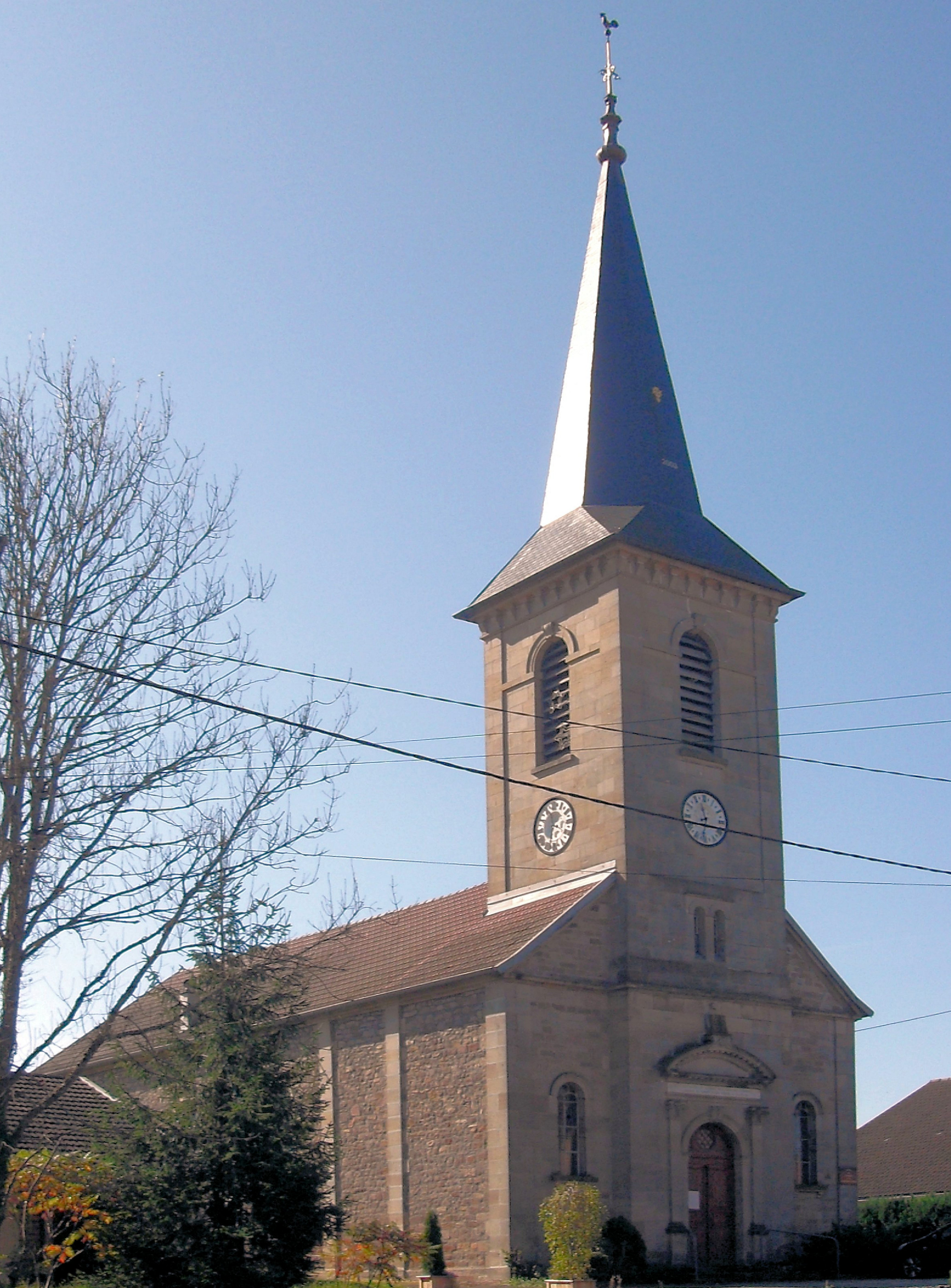 Le temple protestant de Chenebier